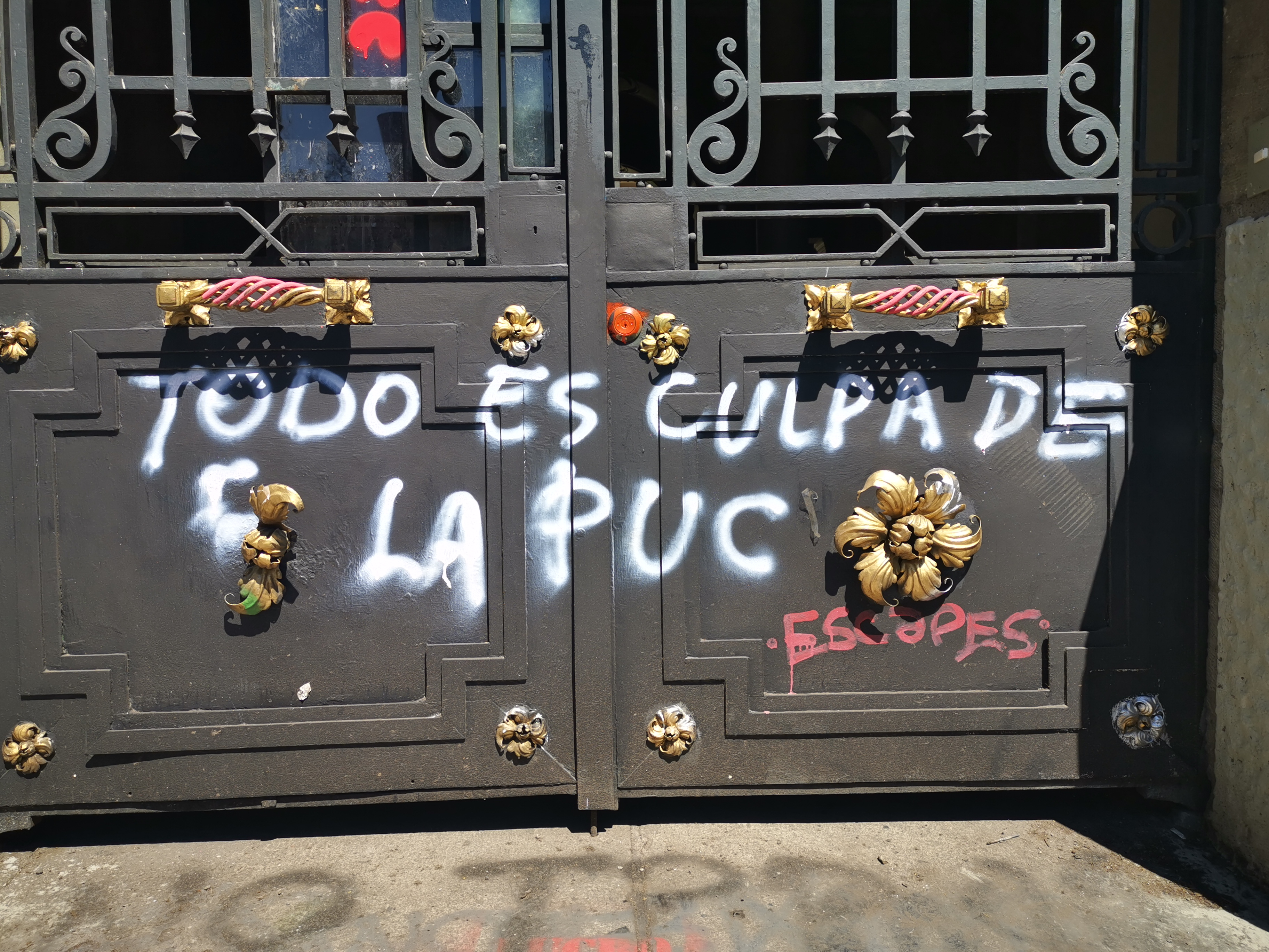 Grafiti "Todo es culpa de la PUC", en uno de lo accesos a la Casa central de la Pontificia Universidad Católica de Chile (PUC).